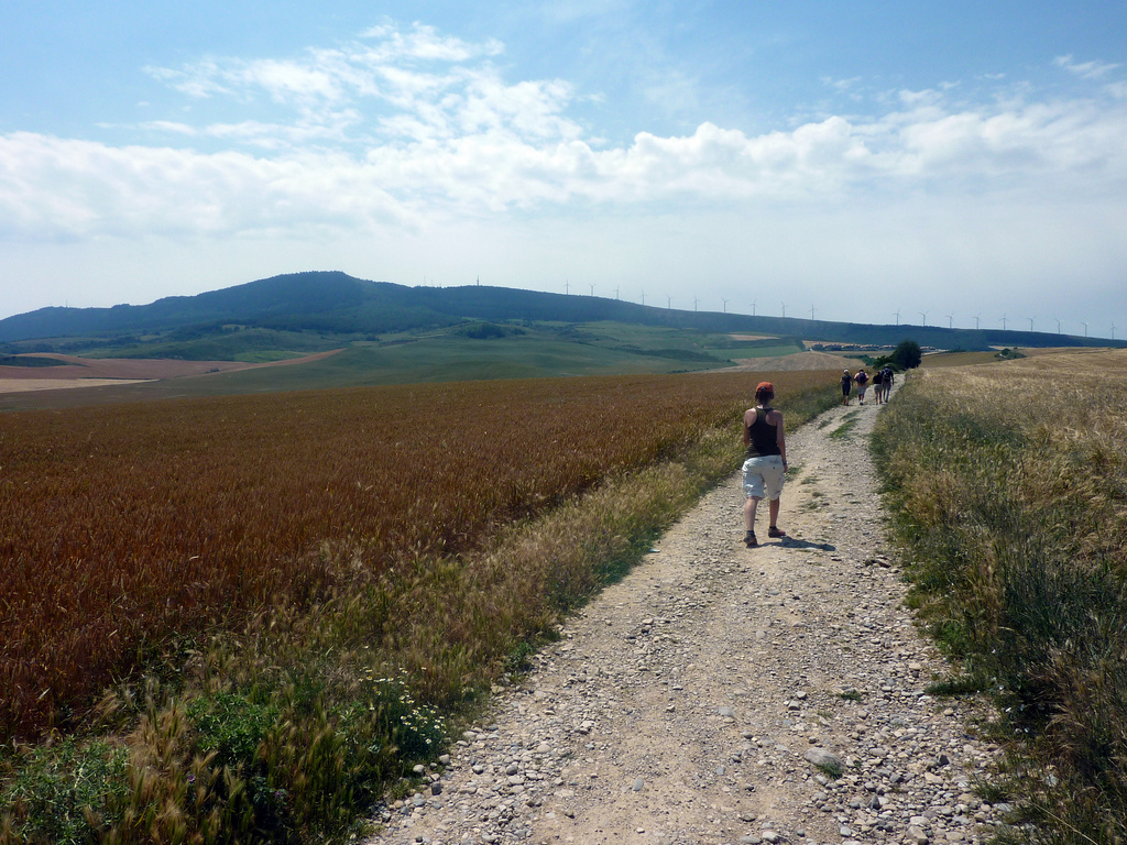 Cesta z Pamplony do pohoří Alto del Perdón, součást Svatojakubské cesty